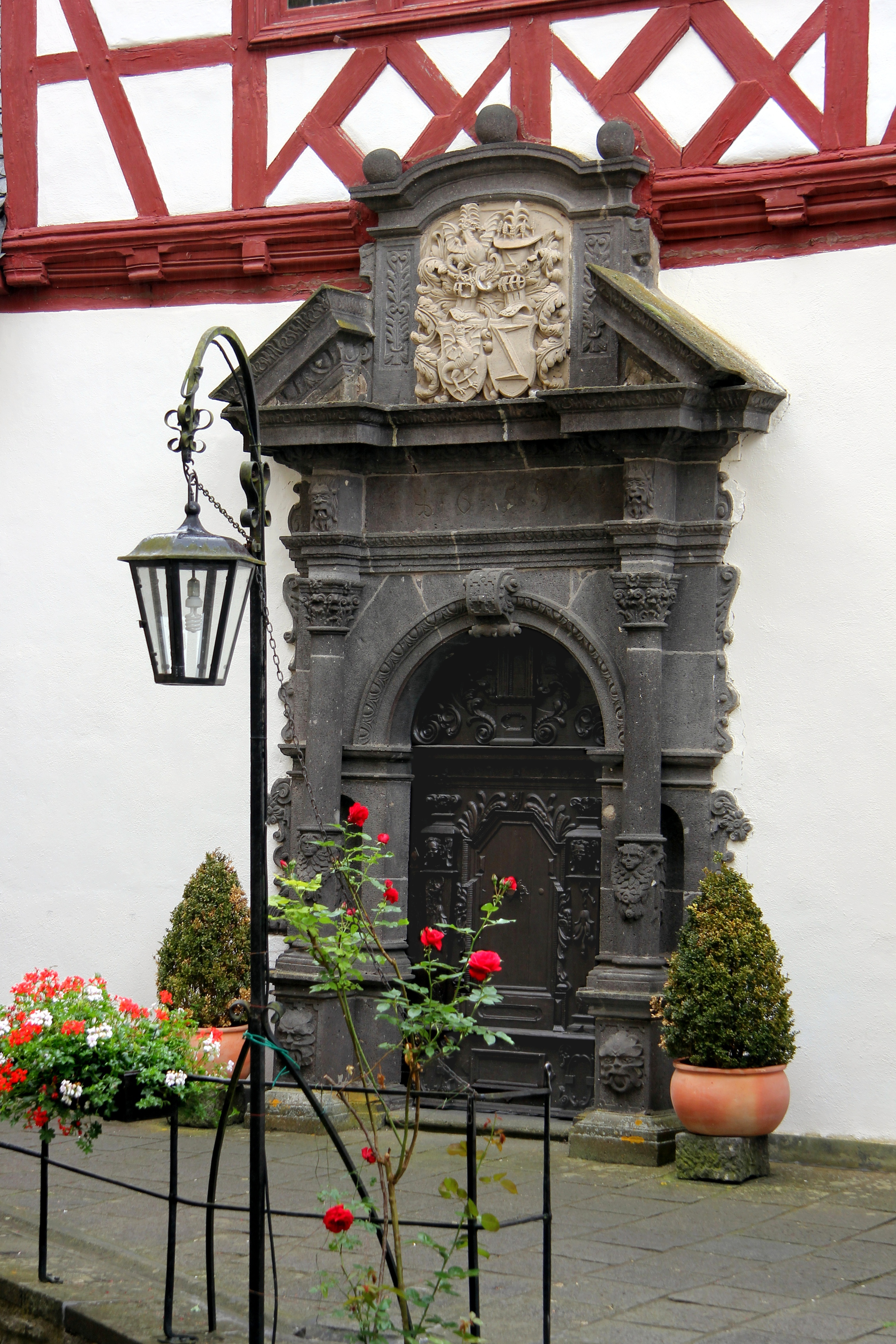 Schloss Bürresheim bei Mayen: Portal zum Amtshaus mit den Wappen der Familien von Breidbach zu Bürresheim und von Metzenhausen